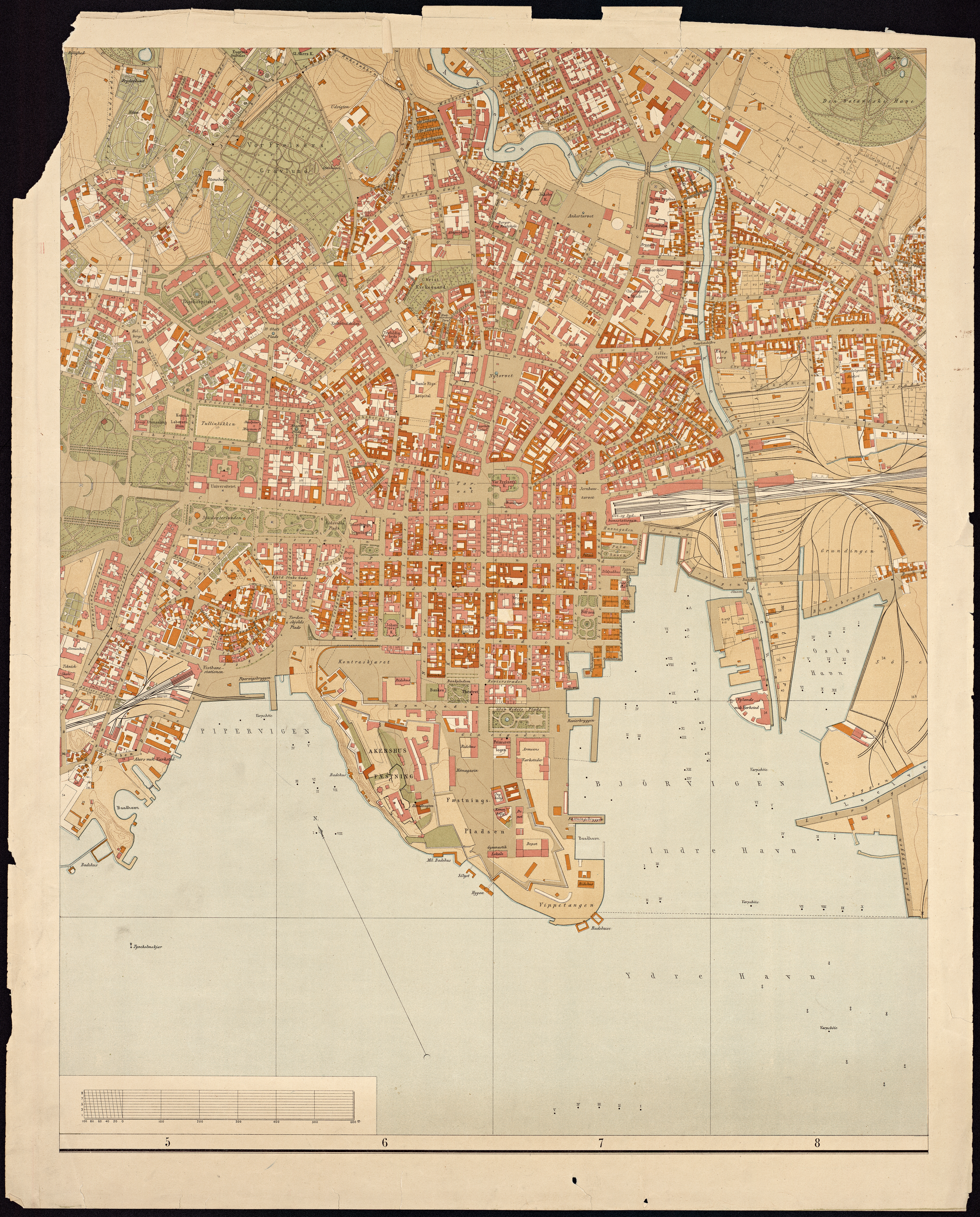 Kart over Kristiania af N. S. Krum, 1888. Blad 5.